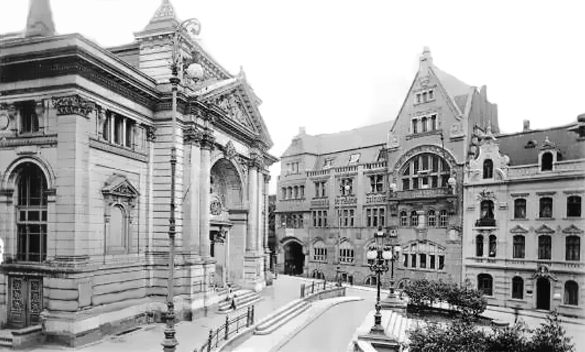 Stadttheater Essen um 1910, heutiges Grillo-Theater